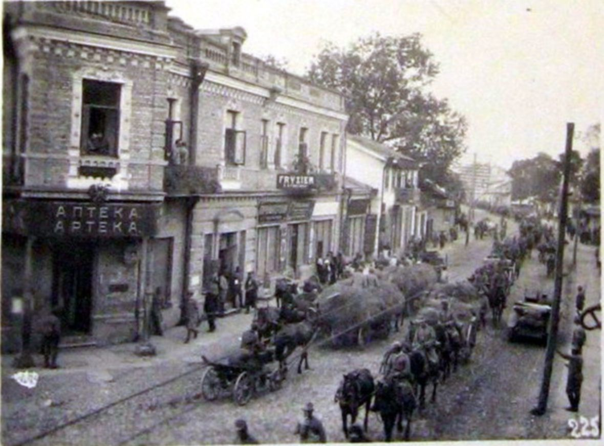 Австрійські вояки проходять в Ковелі біля аптеки Фрідріксонаі, серпень 1915 р